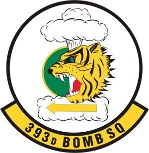 393d Bomb Squadron emblem